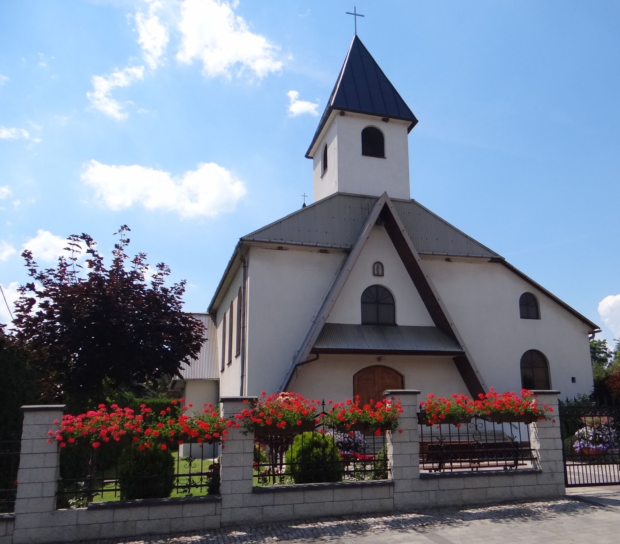 Kościół w Brzezince